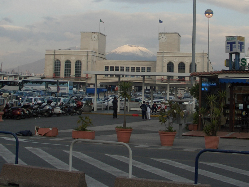 Napoli, Italia8973_vesuvius-framed